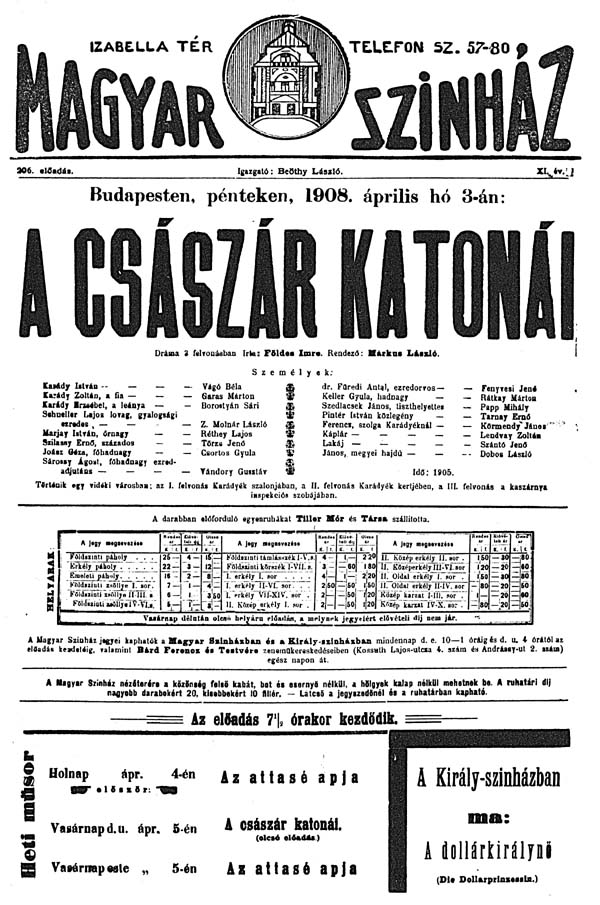 A Magyar Színház színlapja 1908-ból: A császár katonái.